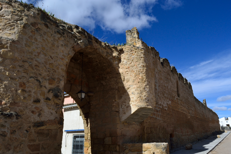 Murallas de Buendía